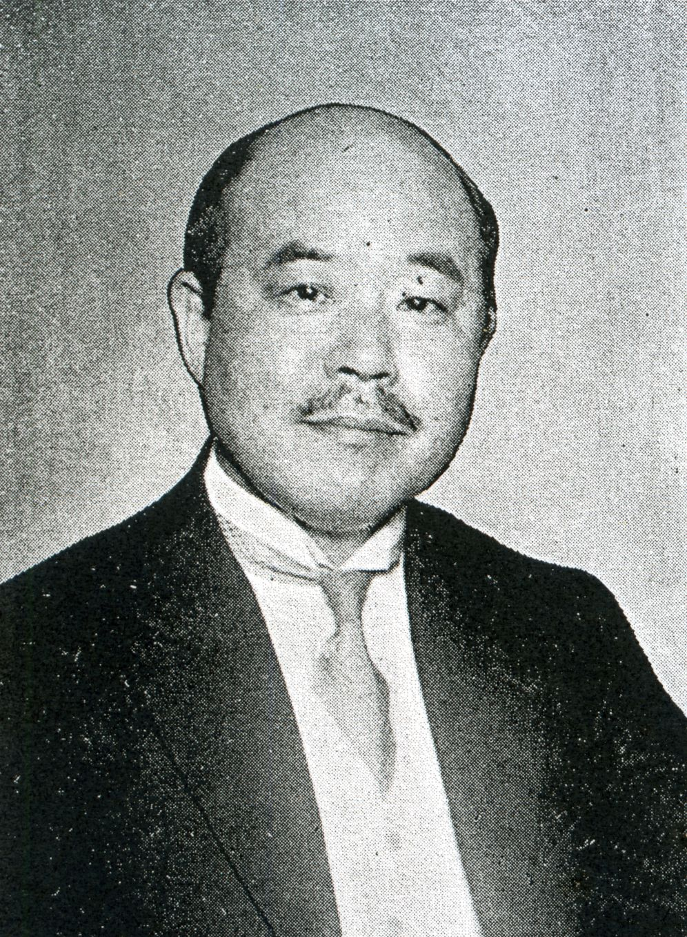 この写真は、1929年頃における丸山鶴吉（1883-1956）の写真です。